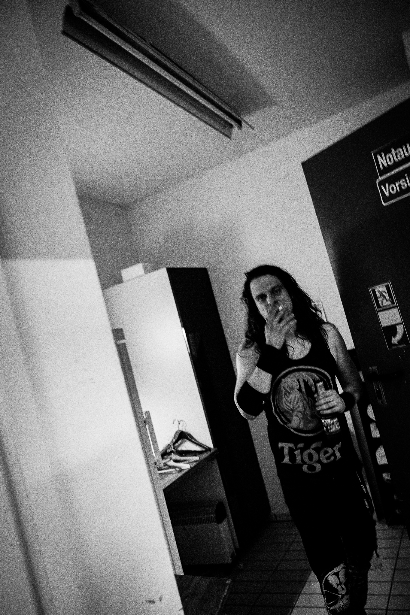 Vince Voltage rauchend in einem raum, schwarz/weiß